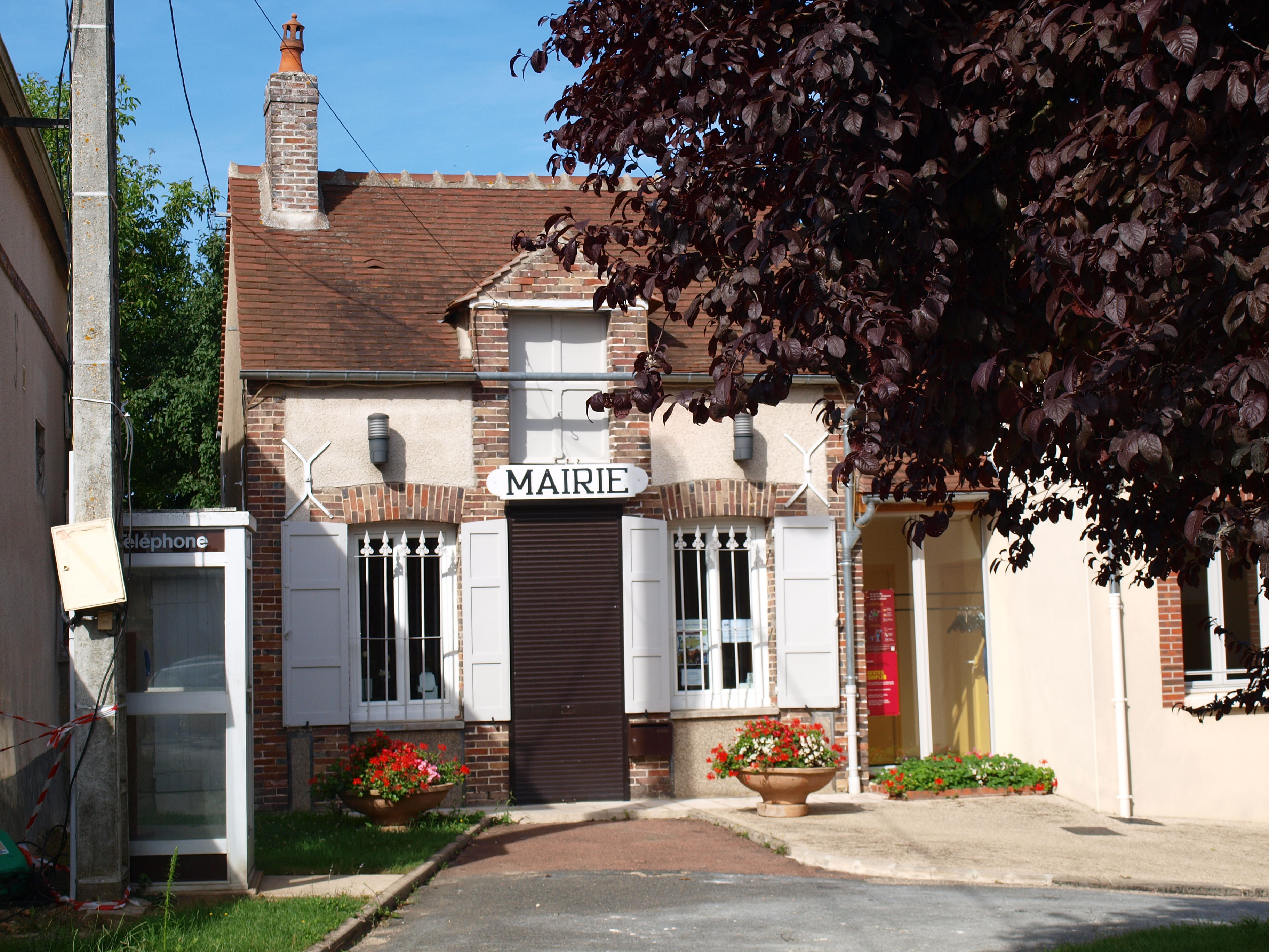 Villenavotte (Yonne, France) ; la mairie.